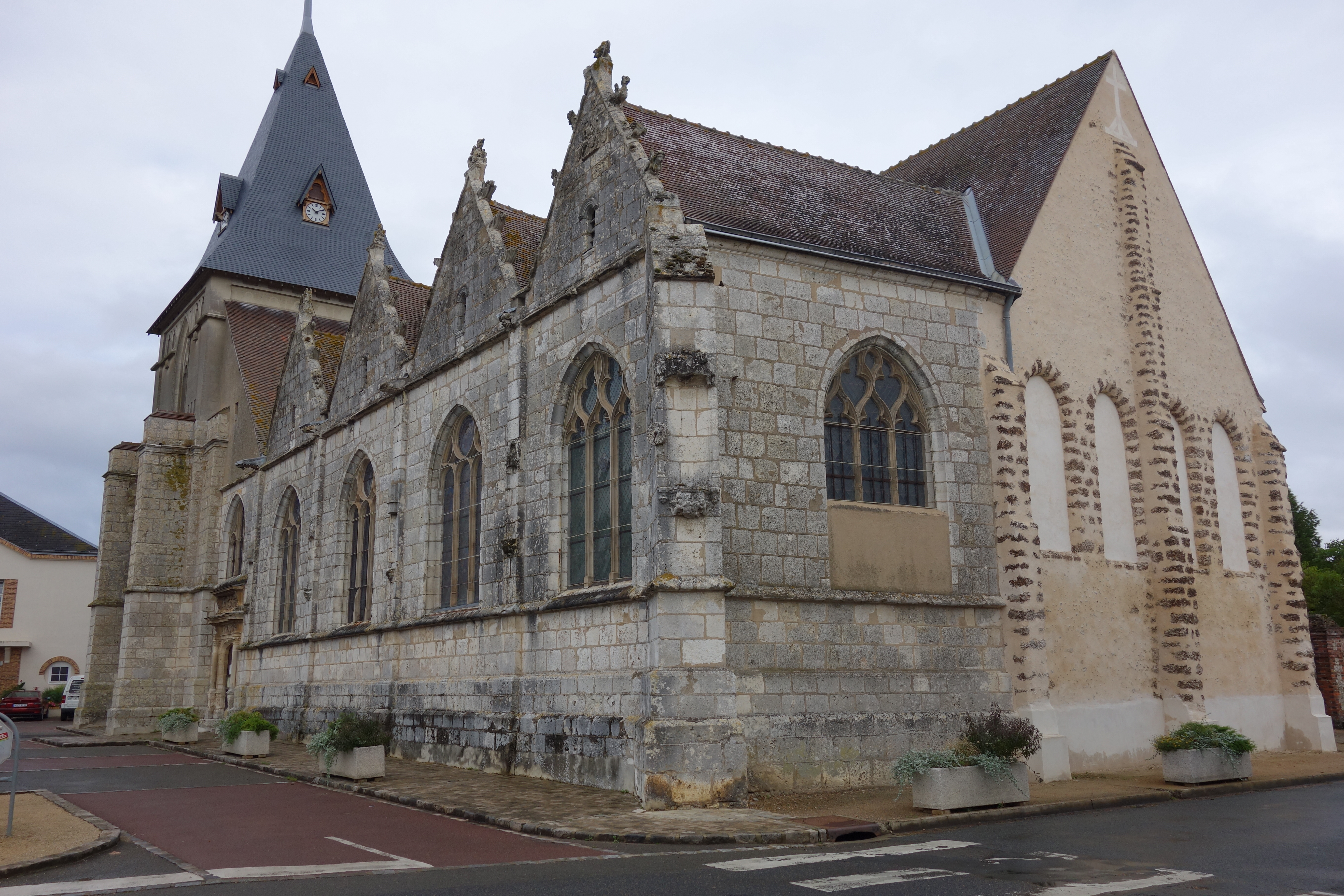 Église Saint-Georges, (Inscrit, 1926) .